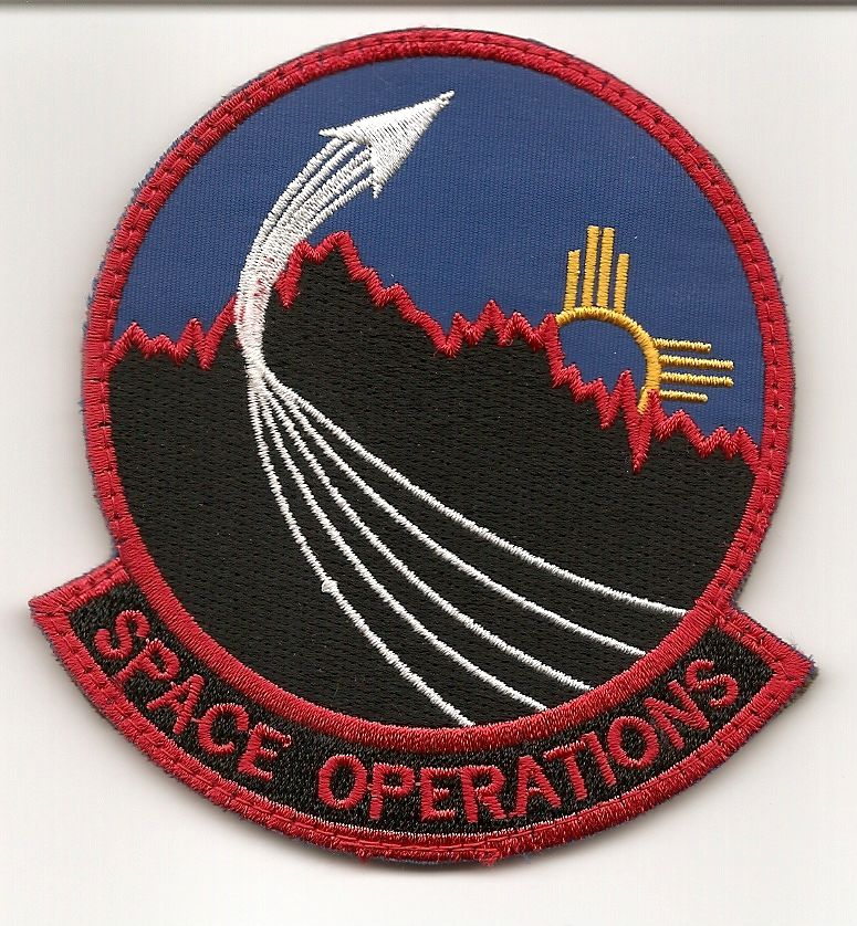 Space_Operations_Squadron emblem